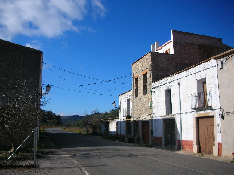 Enroig. Small village close to Xert